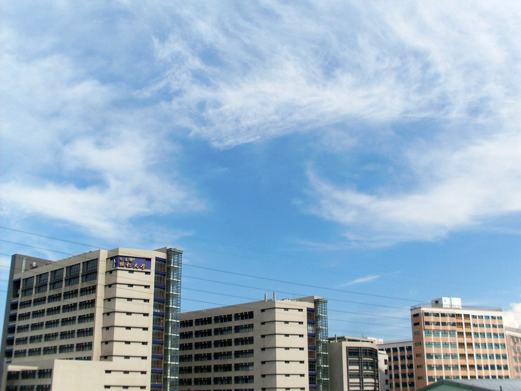 輔大醫學院